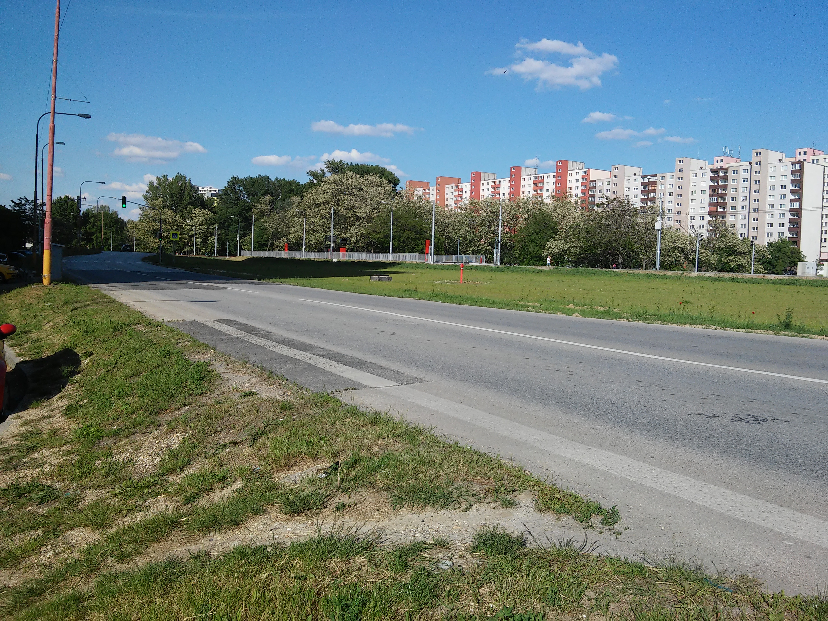 Jantárová cesta, Petržalka, Bratislava